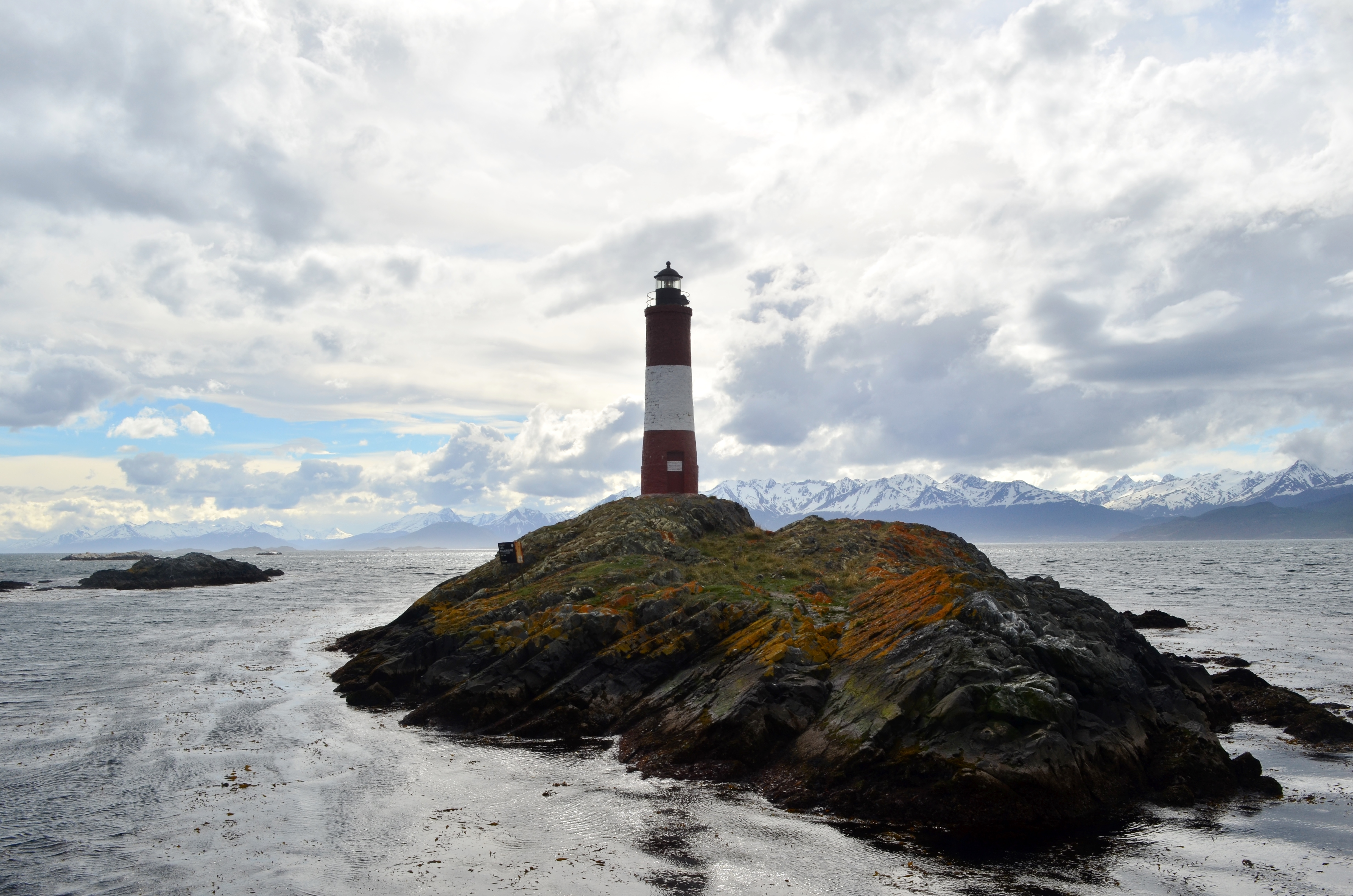 Faro "Les Éclaireurs" (Los Iluminadores) en el Canal de Beagle